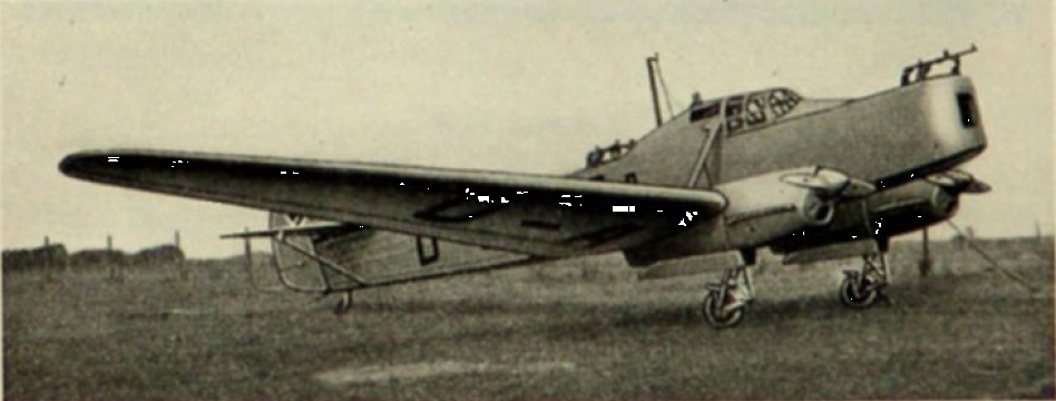 FW58, Gesamtbild, aufgerüstet